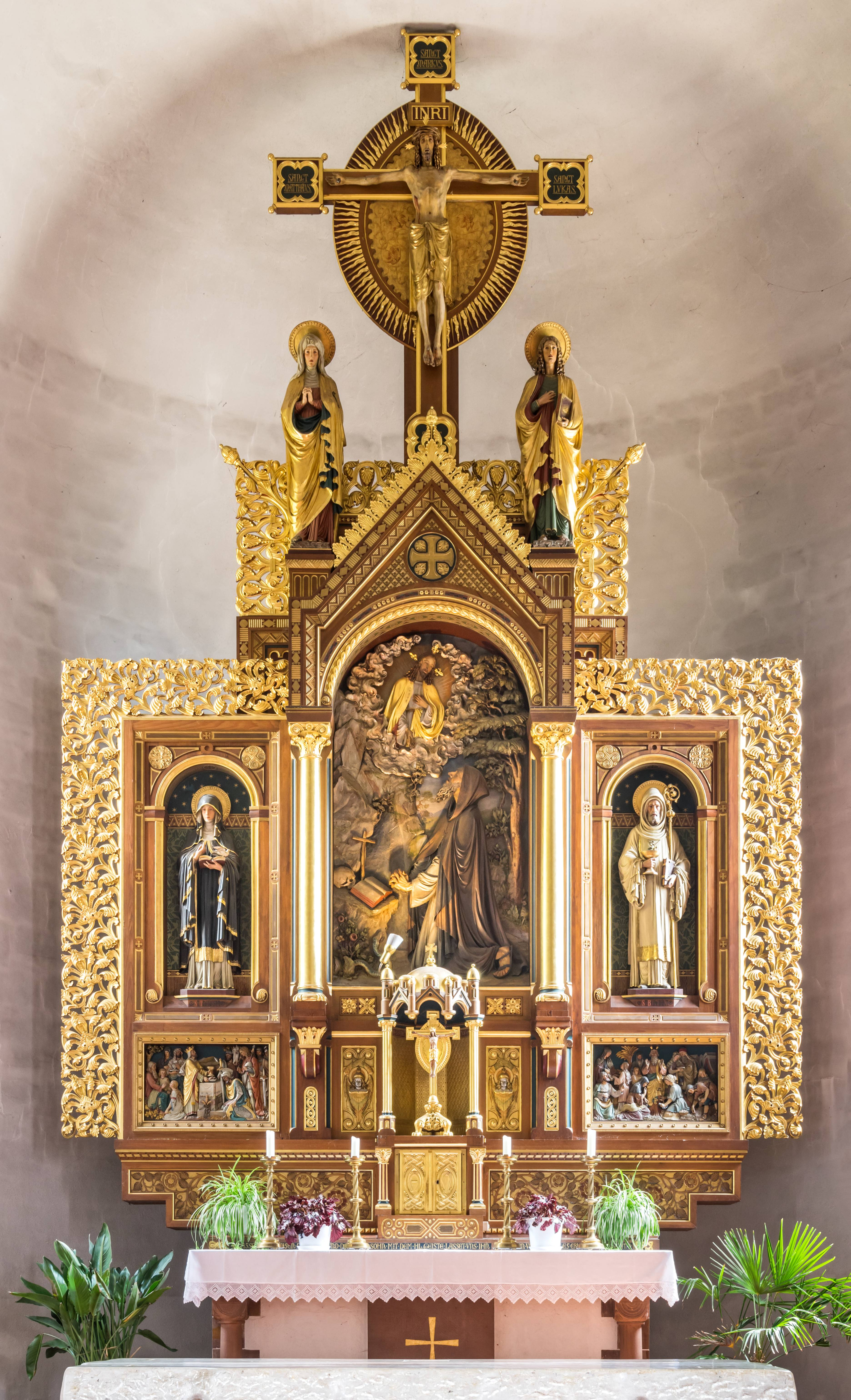 Bilder von der Kirche St Antonius in Schuttertal BIlder vom Hauptaltar